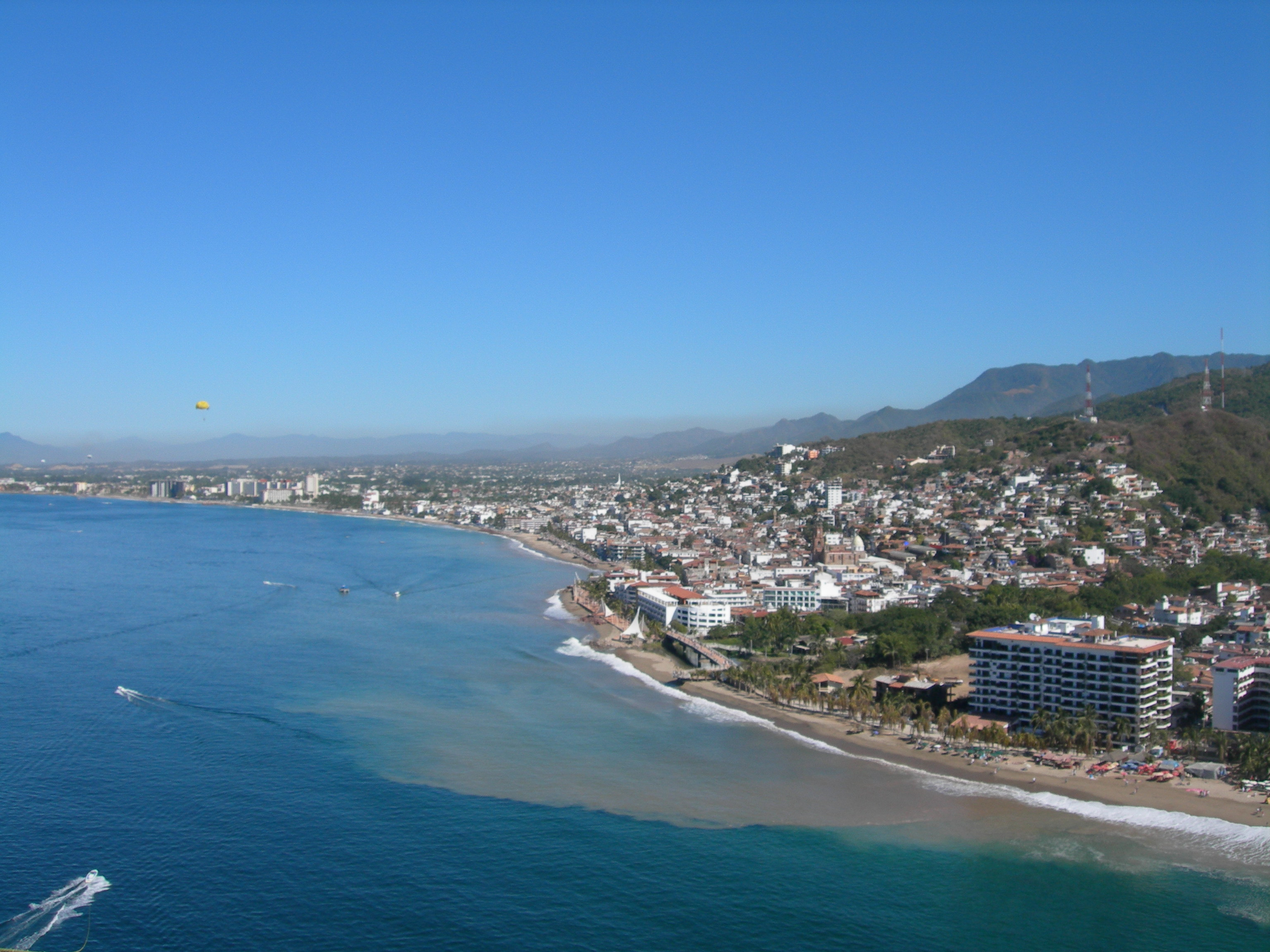 Puerto Vallarta vue du ciel